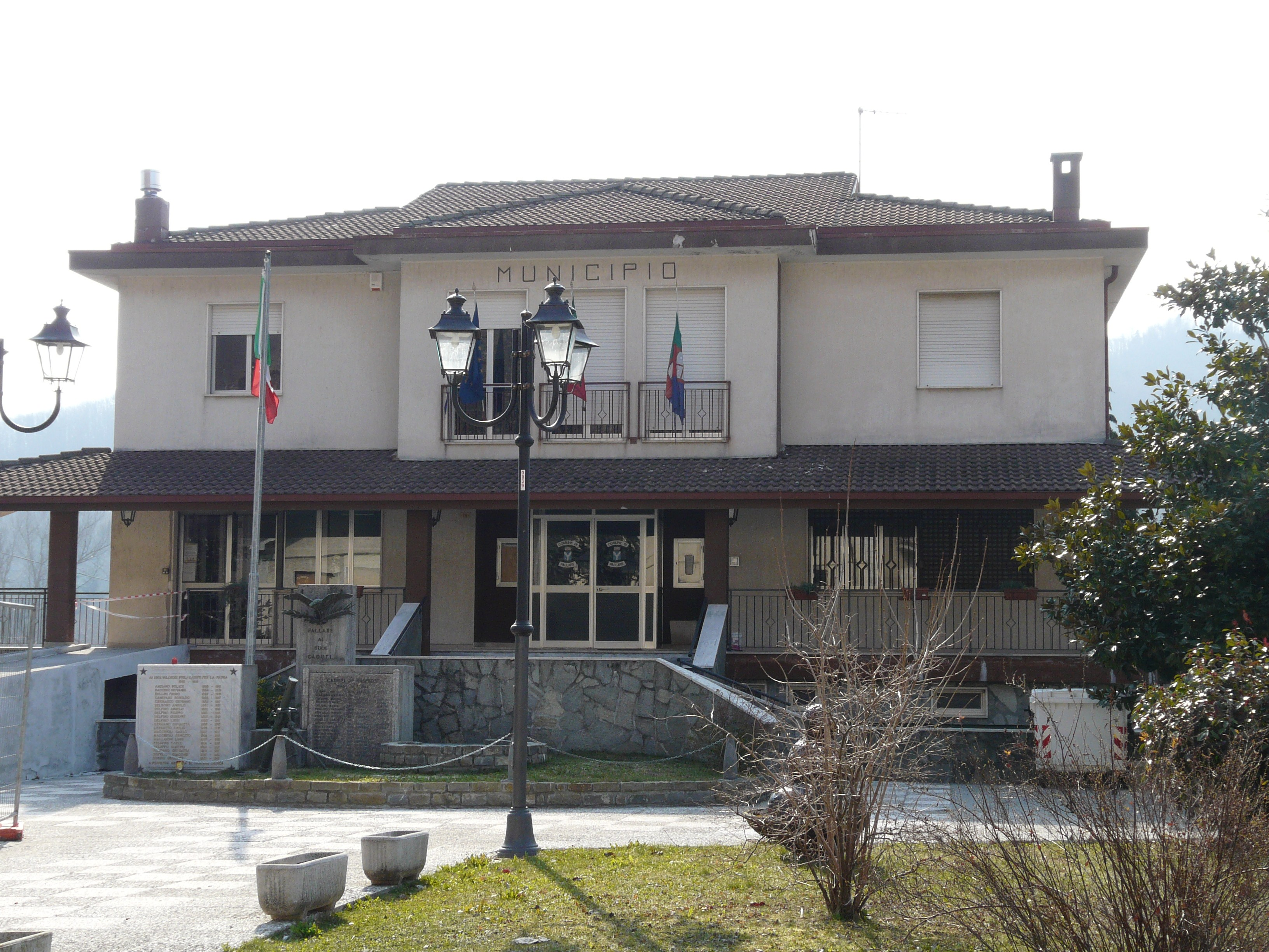 Municipio, Pallare, Liguria, Italia